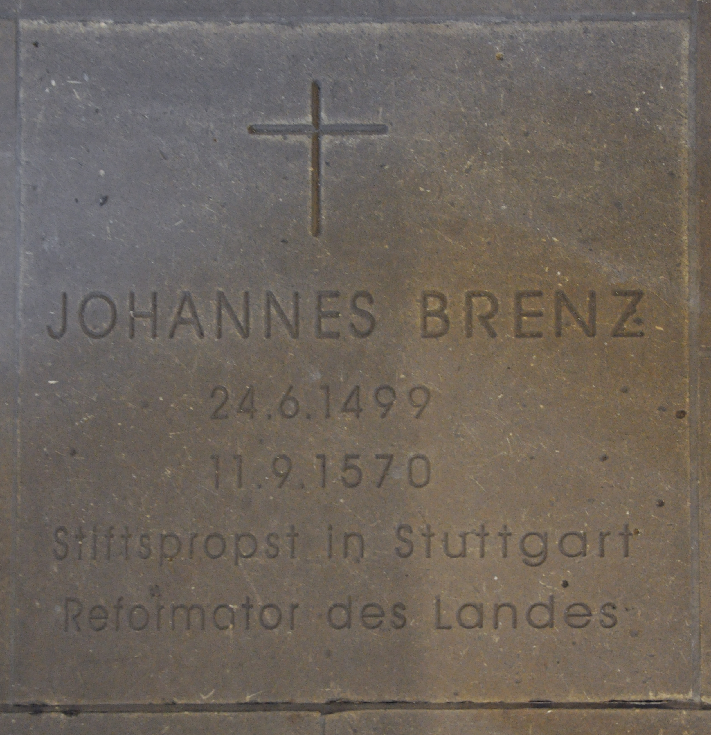 Stuttgart, Stiftskirche, Grabmal Johannes Brenz (unter der Kanzel)